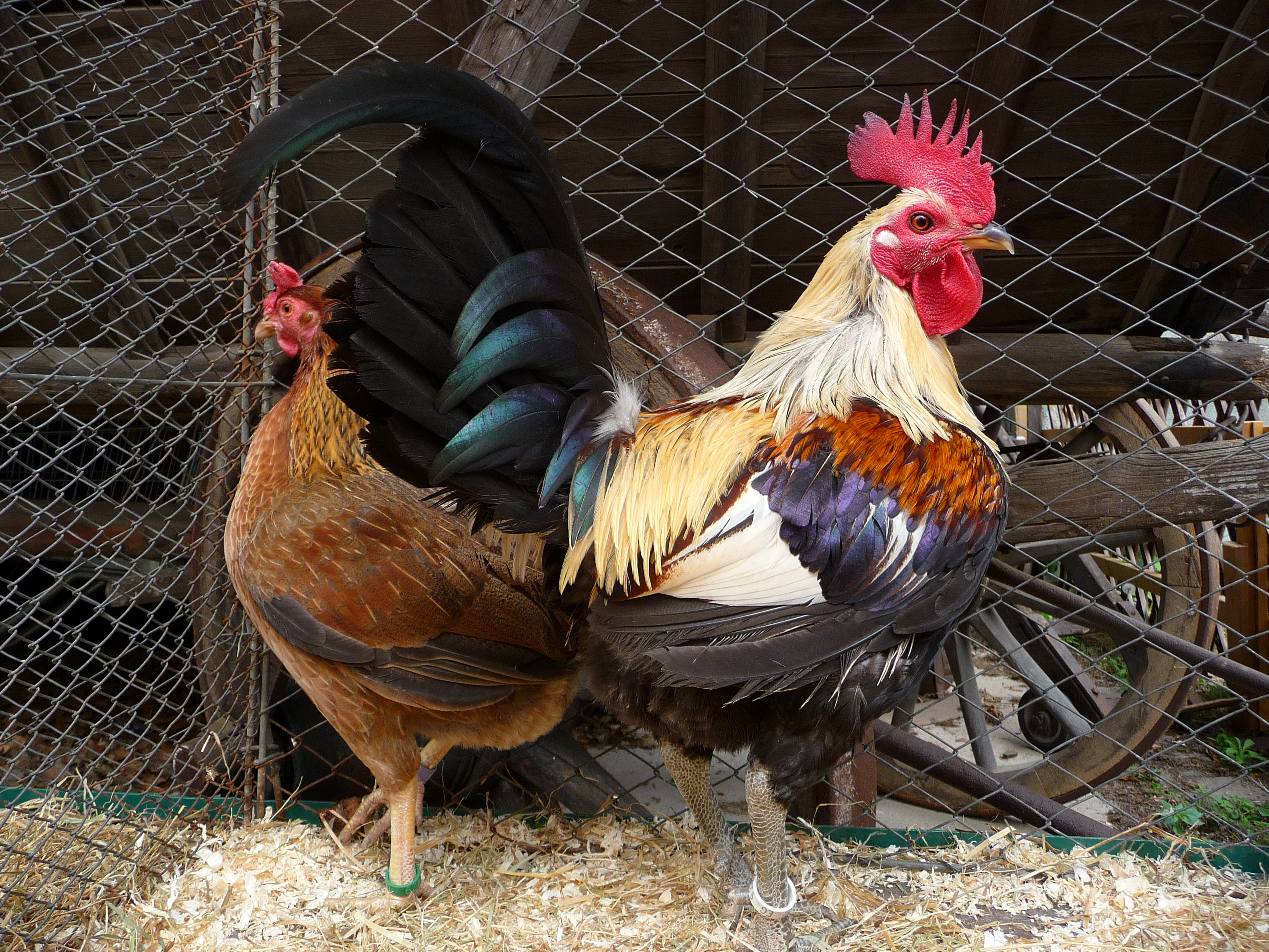 Altenglischer Zwerg-Kämpfer (Old English Game), Hahn und Henne, fotografiert in Baden-Württemberg (Deutschland)